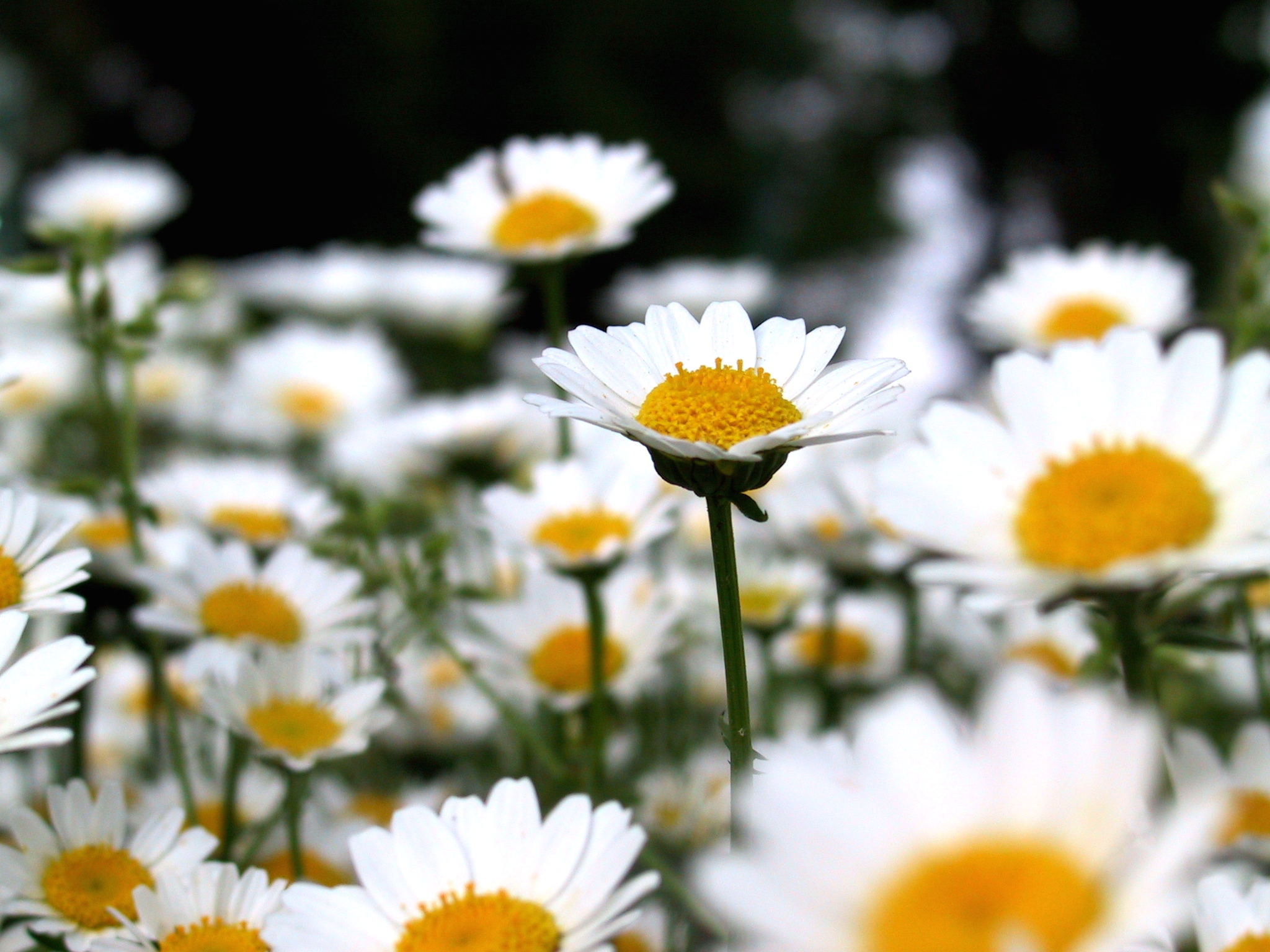 Mauranthemum paludosum